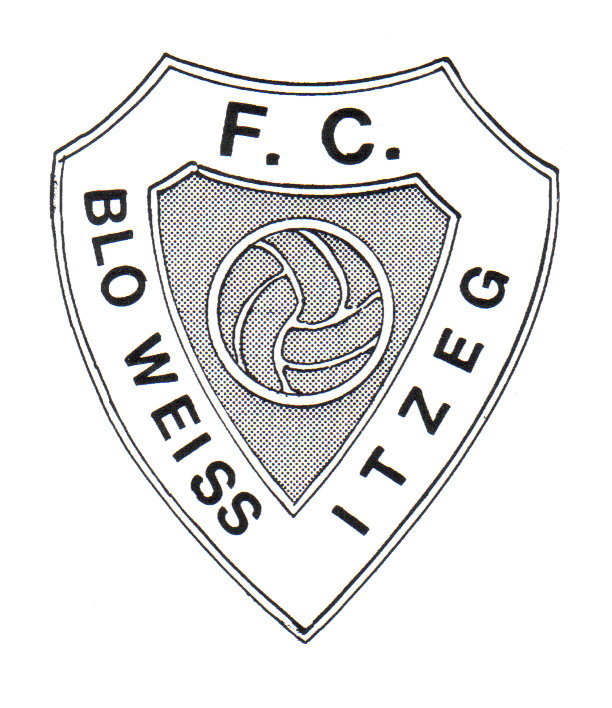 Brun